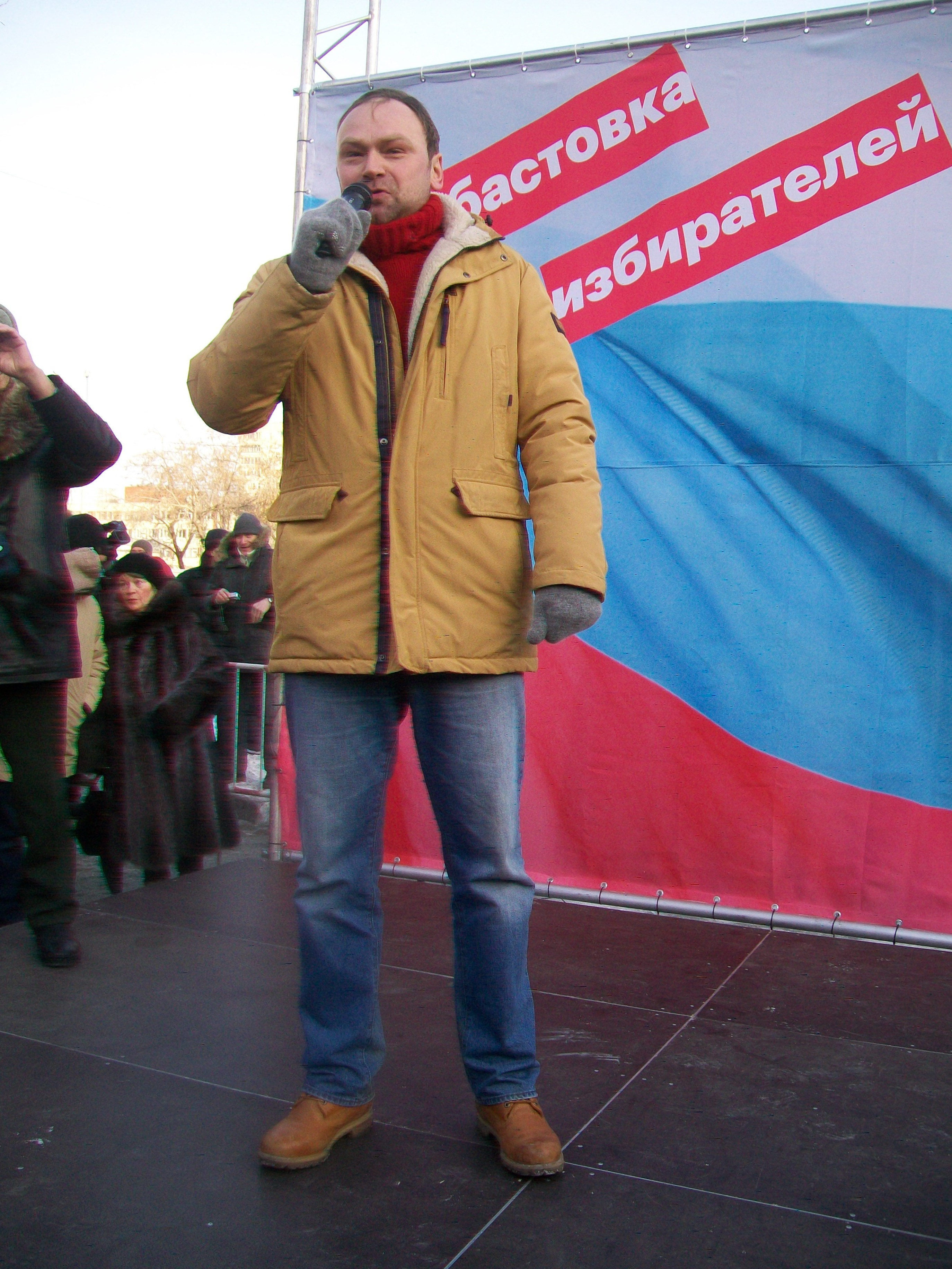 Федор Крашенинников на забастовке избирателей. Екатеринбург, 28 января 2018 года